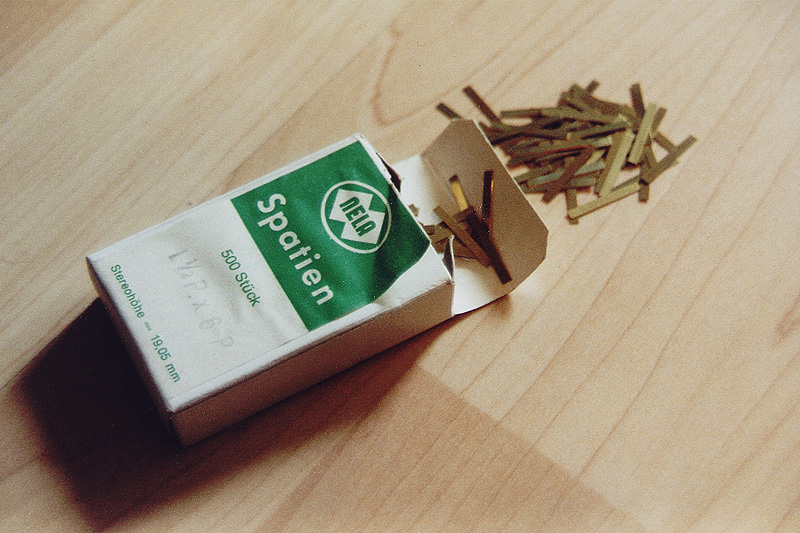 Spatien - Schachtel mit ca. 500 Spatien von Nela